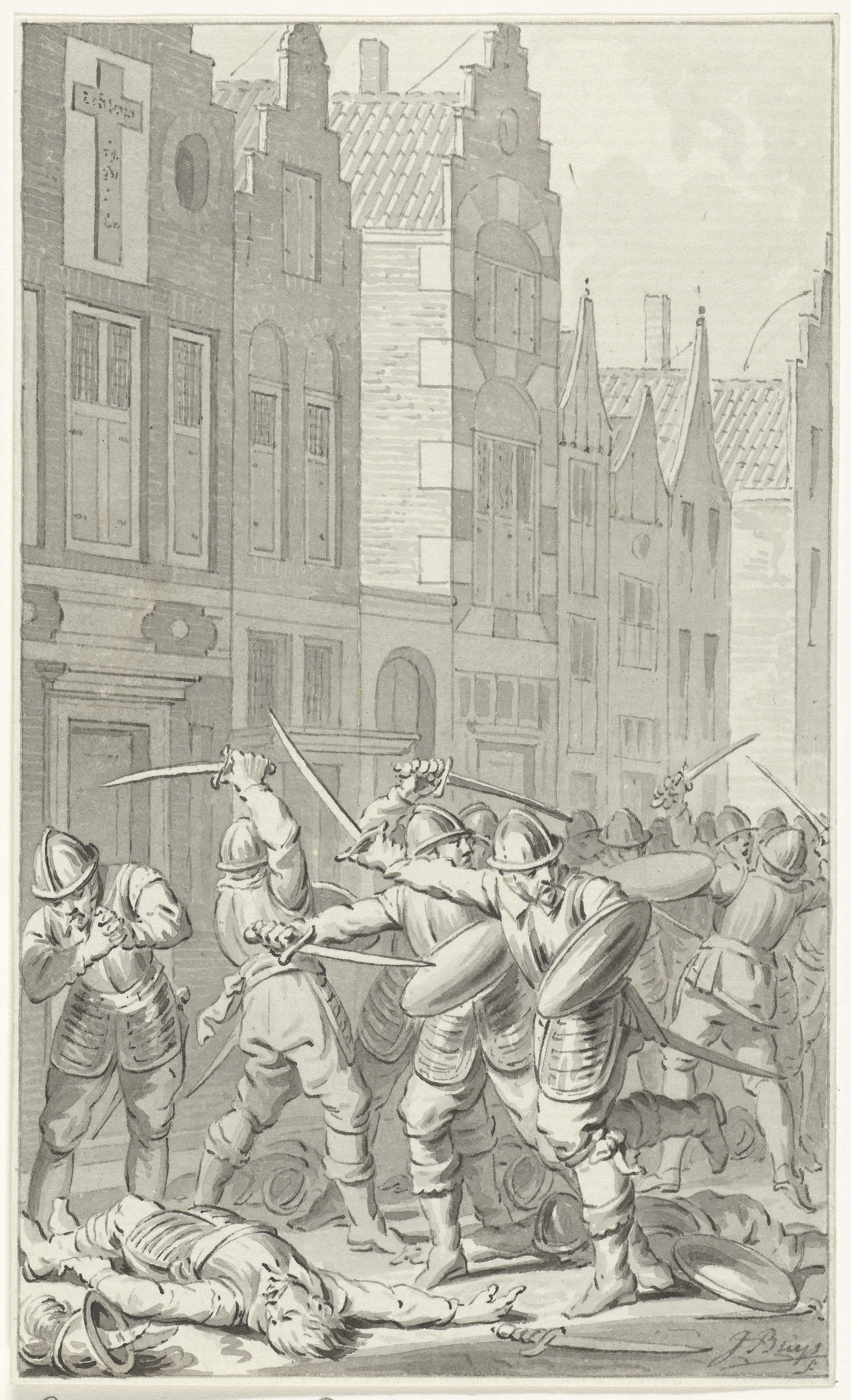 IdentificatieTitel(s): Willem van Arkel sneuvelt in de Krijtsteeg te Gorinchem, 1 december 1417Objecttype: tekening ontwerp historieprent Objectnummer: RP-T-00-1378Catalogusreferentie: FMH 256-cOmschrijving: Willem van Arkel sneuvelt tijdens een gevecht op straat in de Krijtsteeg te Gorinchem, 1 december 1417. Ontwerp voor een prent.VervaardigingVervaardiger: tekenaar: Jacobus Buys (eigenhandig gesigneerd)Datering: 1786 - 1788Fysieke kenmerken: pen en penseel in grijsMateriaal: papier inkt Techniek: pen / penseelAfmetingen: h 150 mm × b 90 mmToelichtingOntwerptekening voor illustratie in: Jacobus Kok, Vaderlandsch Woordenboek, Johannes Allart, Amsterdam 1785-1799, 35 delen, dl. XVIII, pl. III.OnderwerpWat: historical events and situations (with DATE)historical person (ARKEL, Willem van) - scene directly related with life or life-story (ARKEL, Willem van)putting out of action by killing - HH - being put out of actionviolent death, being killed; being mishandled and maltreated; seeking deathHoekse en Kabeljauwse twistenWanneer: 1412-12-01 - 1412-12-01Waar: GorinchemKrijtsteegWie: Willem van ArkelVerwerving en rechtenVerwerving: aankoop 1881Copyright: Publiek domein